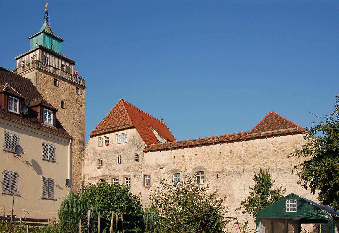 Westgiebel des Wimpelinhofs auf der Stadtmauer, links das Obere Tor